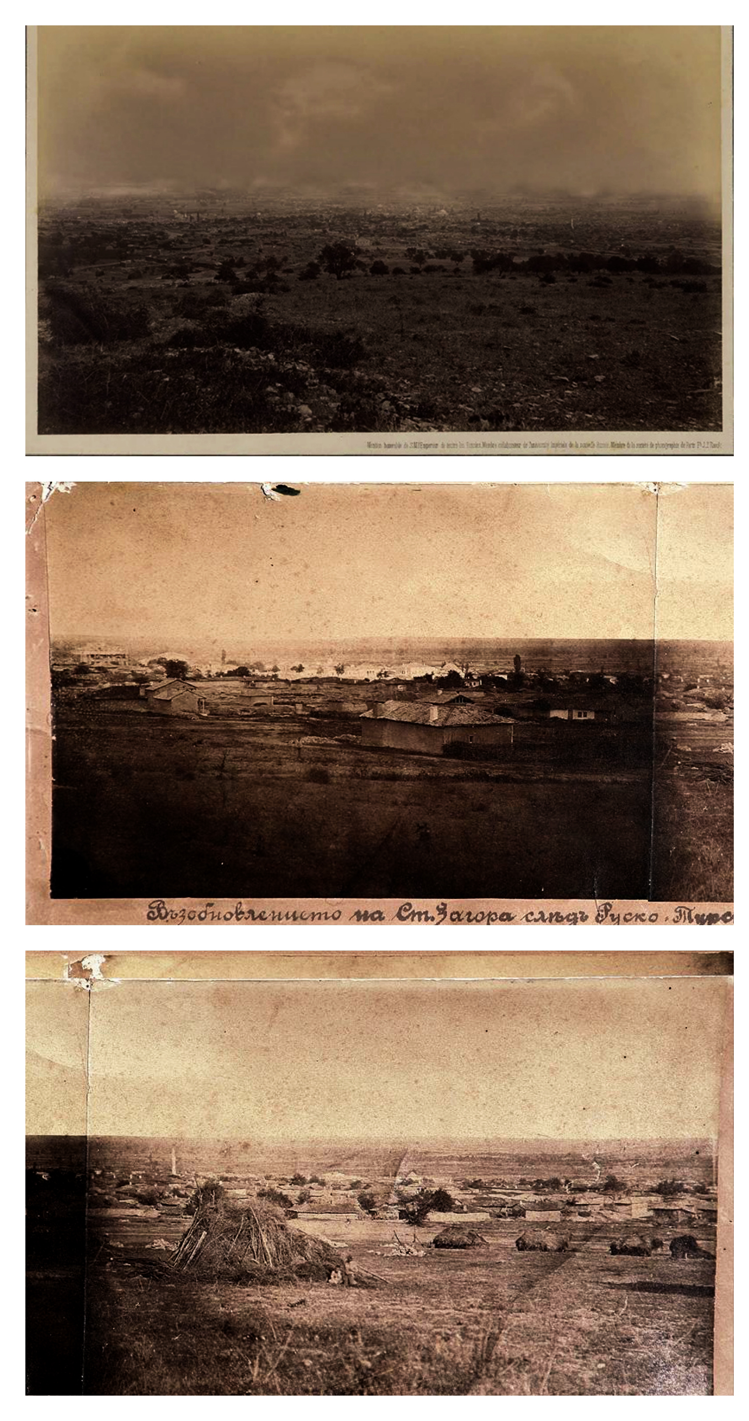 1.Уникалната снимка "Изглед от развалините на град Ески-Загра" на френския фотограф Жан Ксавие Раул , улавяща опожарения и унищожен град през 1877-ма година. Долните 2 снимки-Възобновлението на Стара Загора след Руско-турската война от 1878 год.